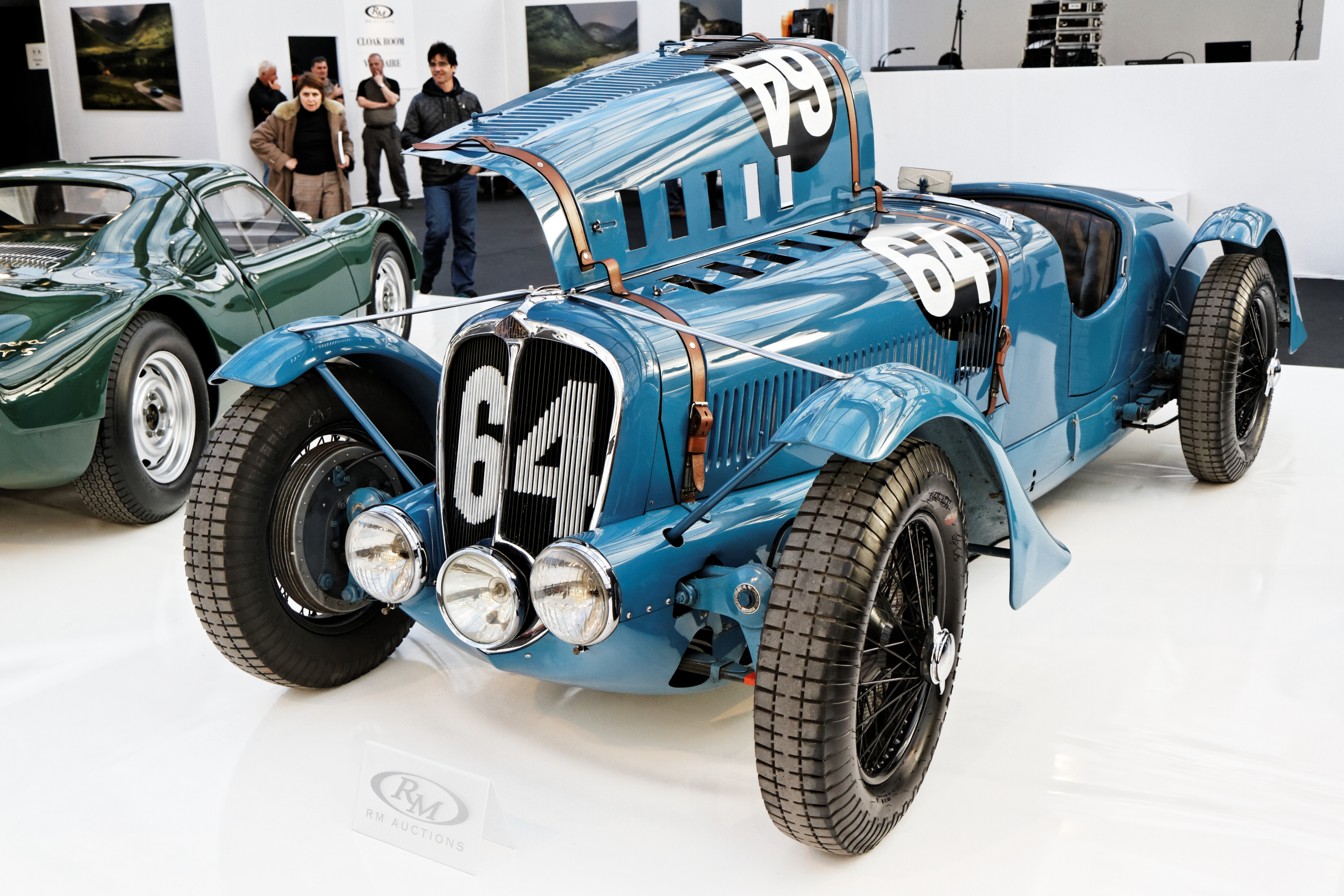 Une Delahaye 135 S de 1936.